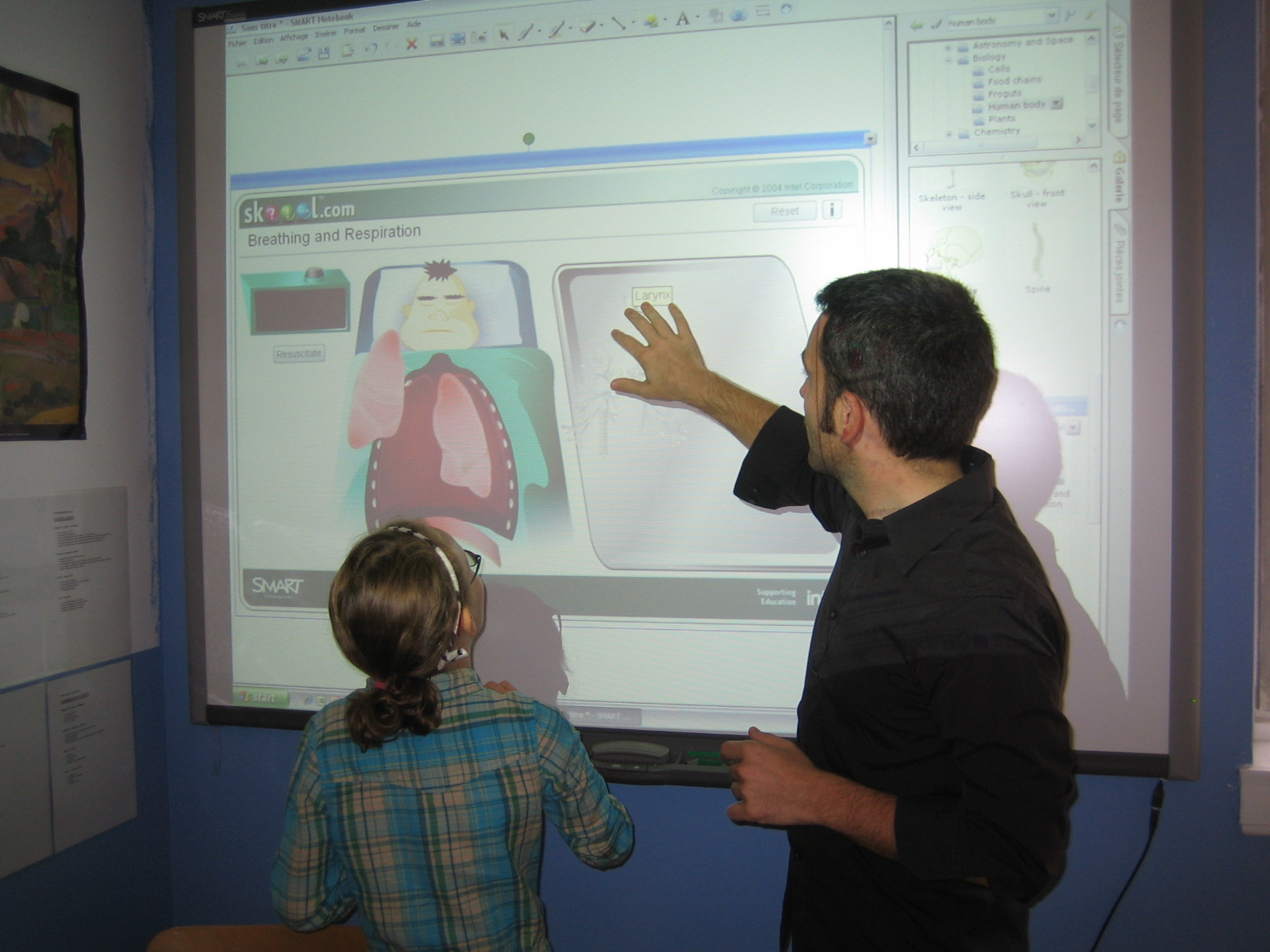 La nouvelle technologie au service des élèves : Le Smart Board en CM2